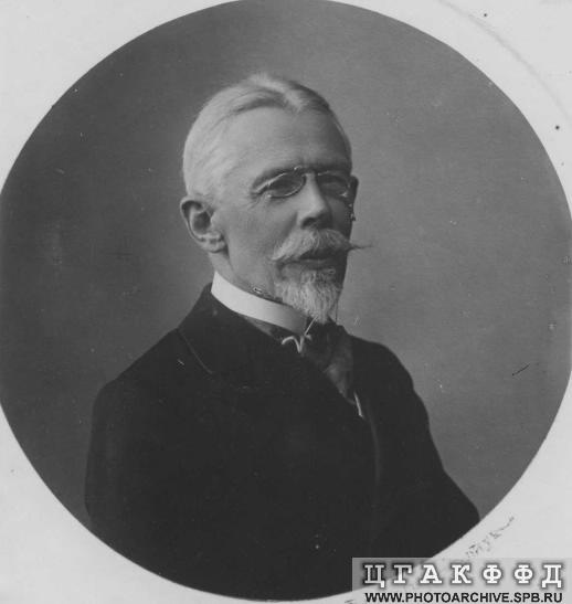 Товарищ министра внутренних дел Н.А.Зиновьев